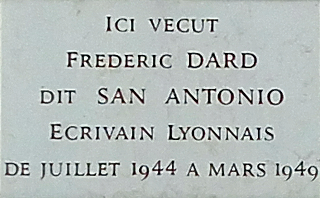 Plaque commémorative n°4 rue Calas, à la Croix-Rousse (Lyon) : ici vécut Frédéric Dard dit San Antonio écrivain lyonnais de juillet 1944 à mars 1949